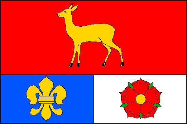 Vlajka obce Srnín